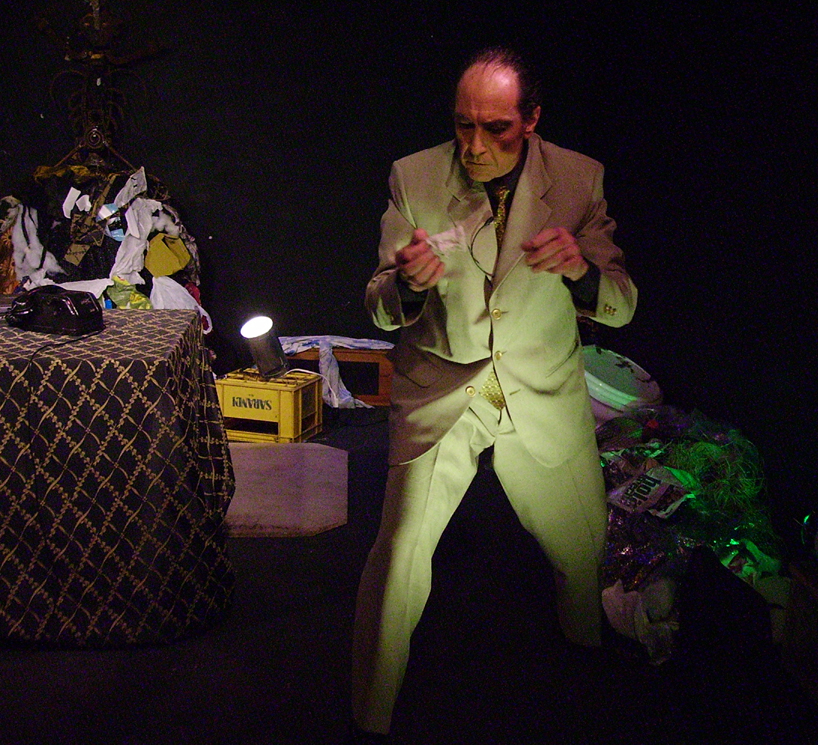 El actor Roberto Foliatti en "Basura", de Carlos Rehermann